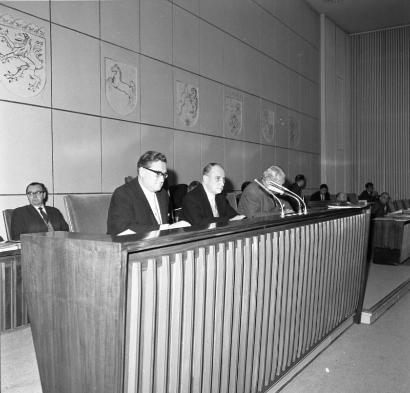 Plenarsitzung des Bundesrates unter Min. Präs. Dr. Diederichs (Niedersachsen) (von rechts nach links): Staatsminister Dr. Haas, Bayern (Schriftführer) Vizepräsident Dr. Diederichs, Ministerpräsident von Niedersachsen Direktor des Bundesrates, Dr. Pfitzer, Ministerialdirektor